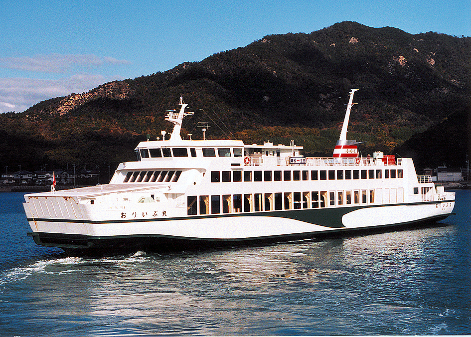 関西急行フェリー 高松－土庄航路フェリー おりいぶ丸